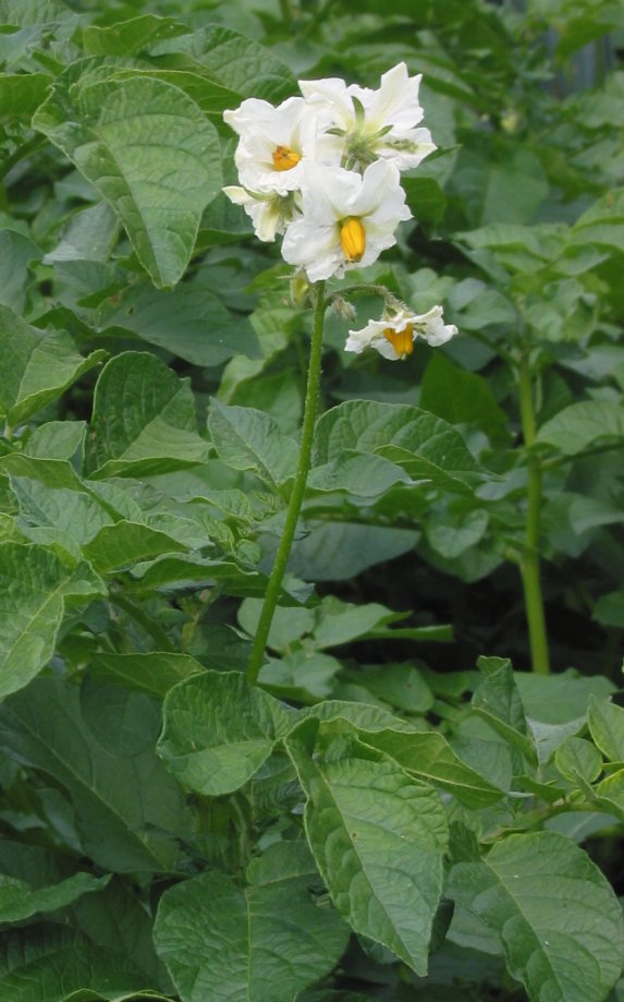 zelfgemaakte foto van bloeiende aardappel ras Fresco half juni Categorie:Afbeelding plant